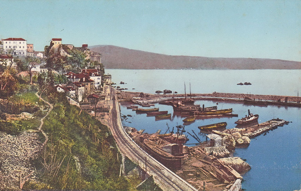 Herceg Novi (Castelnuovo) mit Hafen